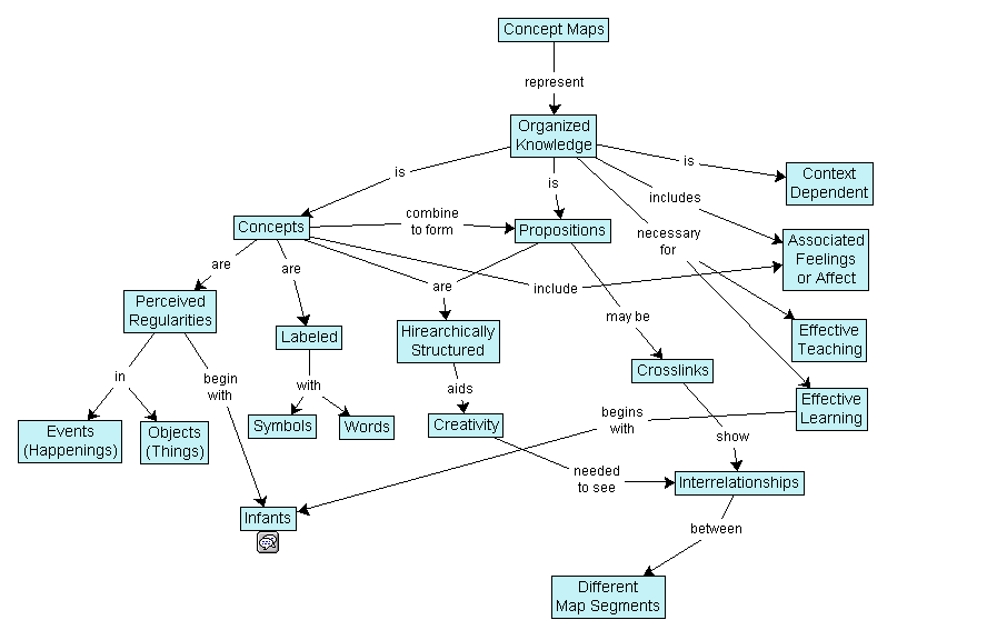 Concept map